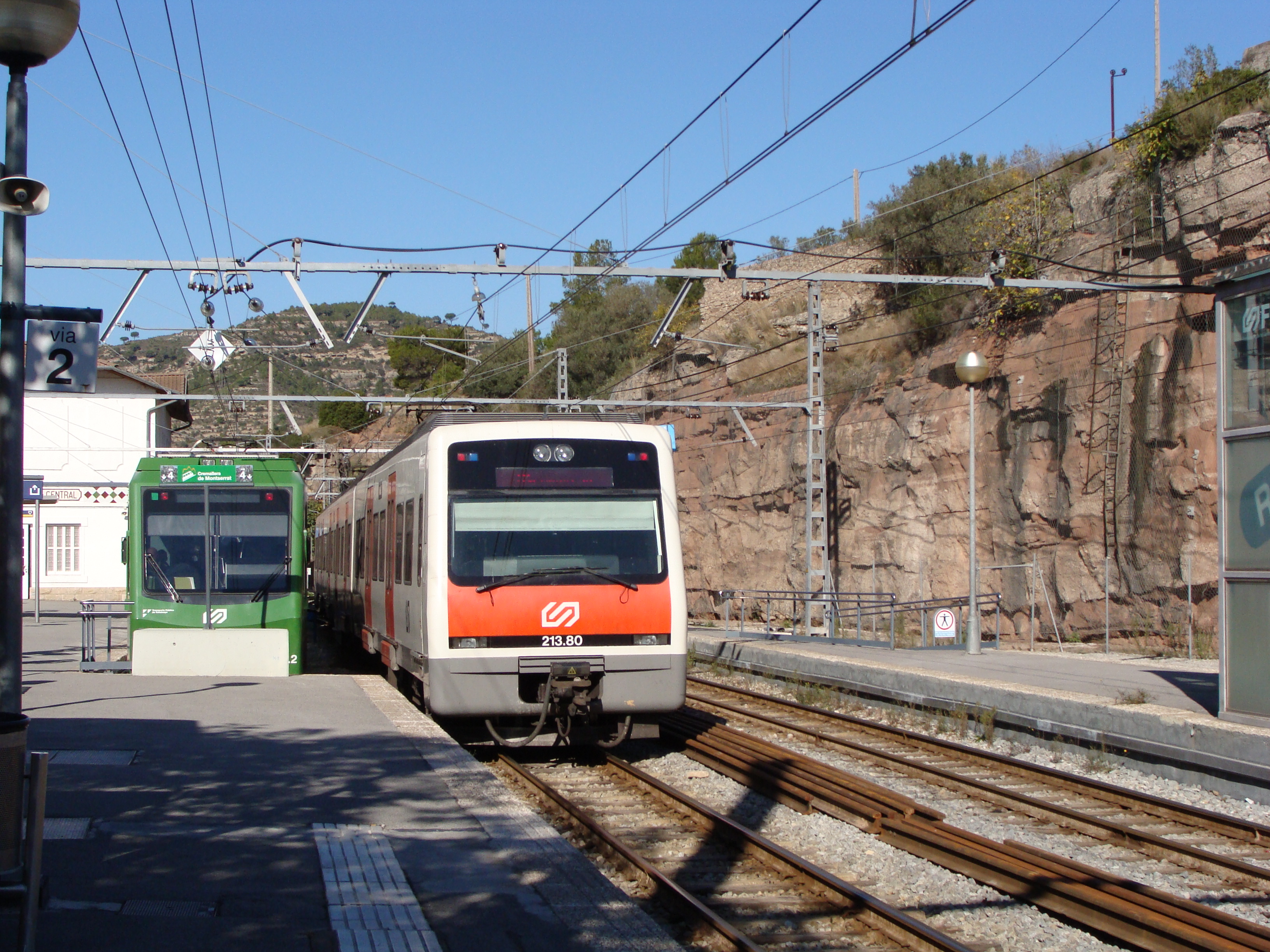 Inicio del Cremallera de Montserrat en la Estación de Monistrol de FGC.